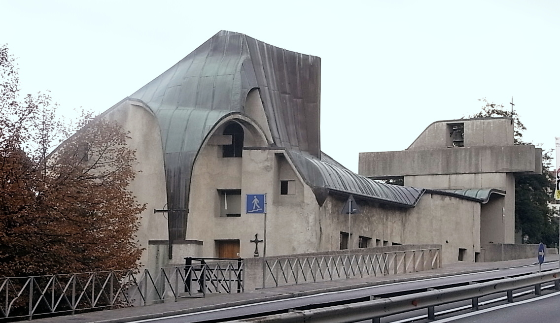 Die Kirche Maria Trost (Santuario della Beata Vergine della Consolazione) in Borgo Maggiore (San Marino).